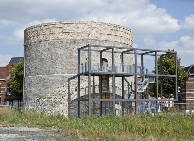 La Tour Valenciennoise, dernier vestige des fortifications médiévales de Mons.